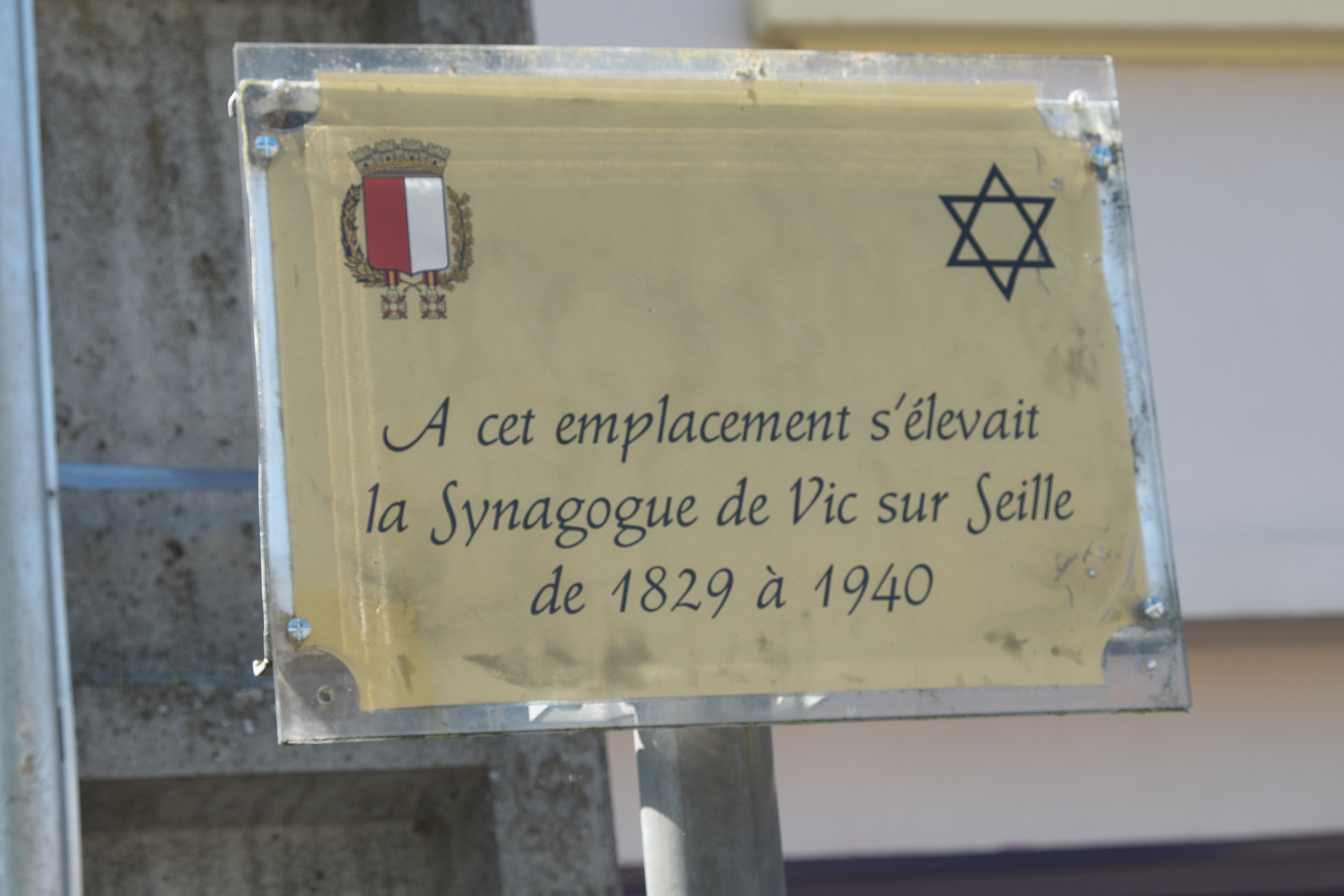 Gedenktafel zur Synagoge in Vic-sur-Seille im Département Moselle in der Region Grand Est/Frankreich